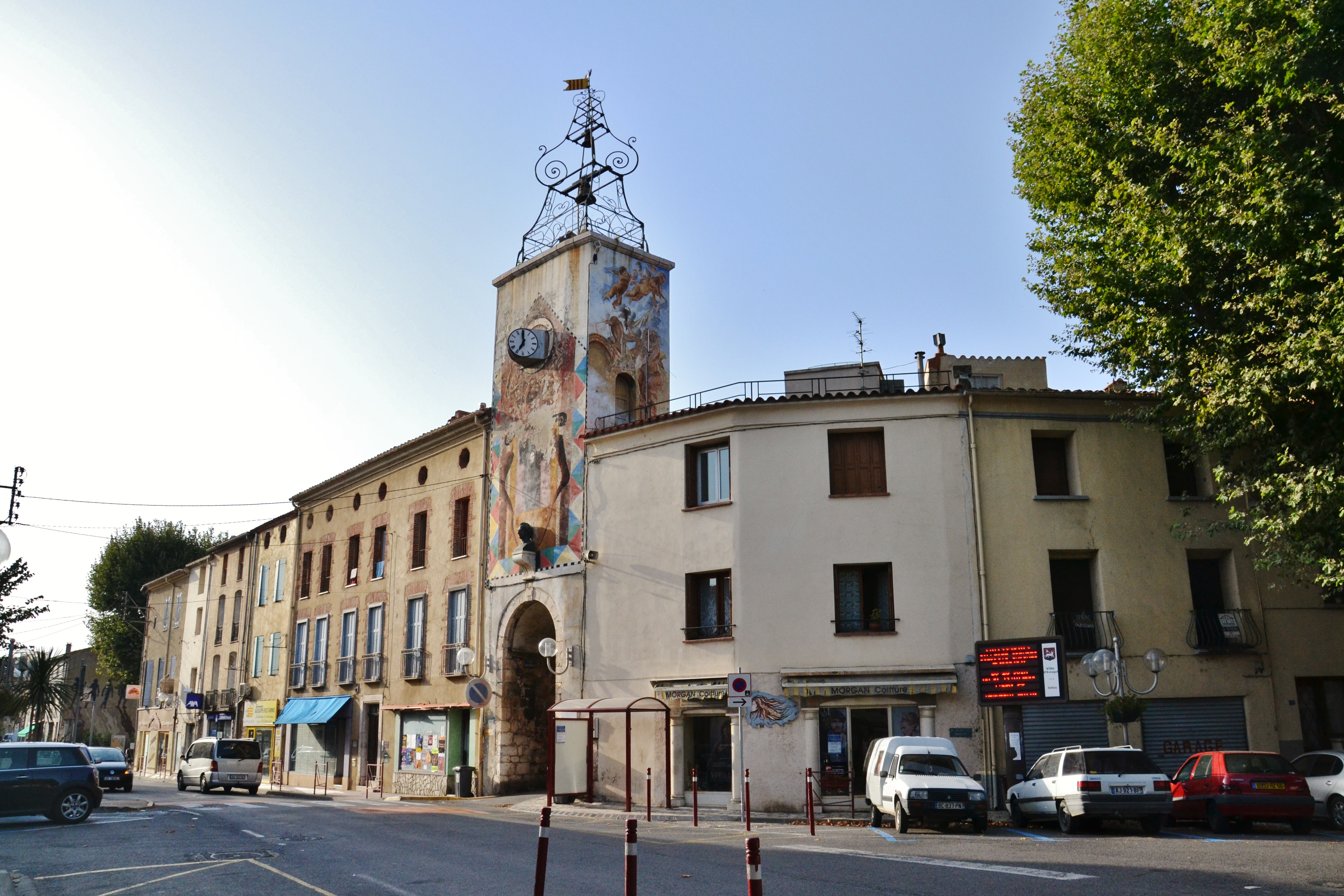 La tour de l'horloge, dans le centre d'Estagel (Pyrénées-Orientales, France)